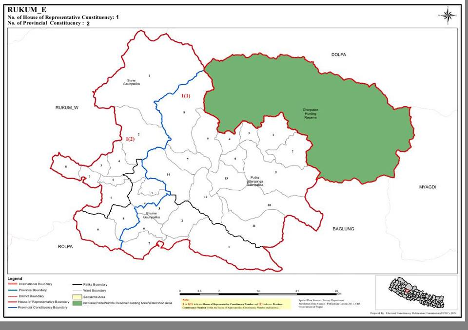 नेपाली: पुर्वी रुकुम नक्सा